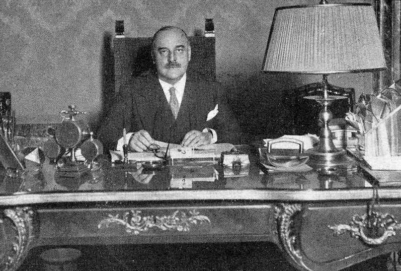 Julio Wais Sanmartín, fotografía en Vida Gallega 1932